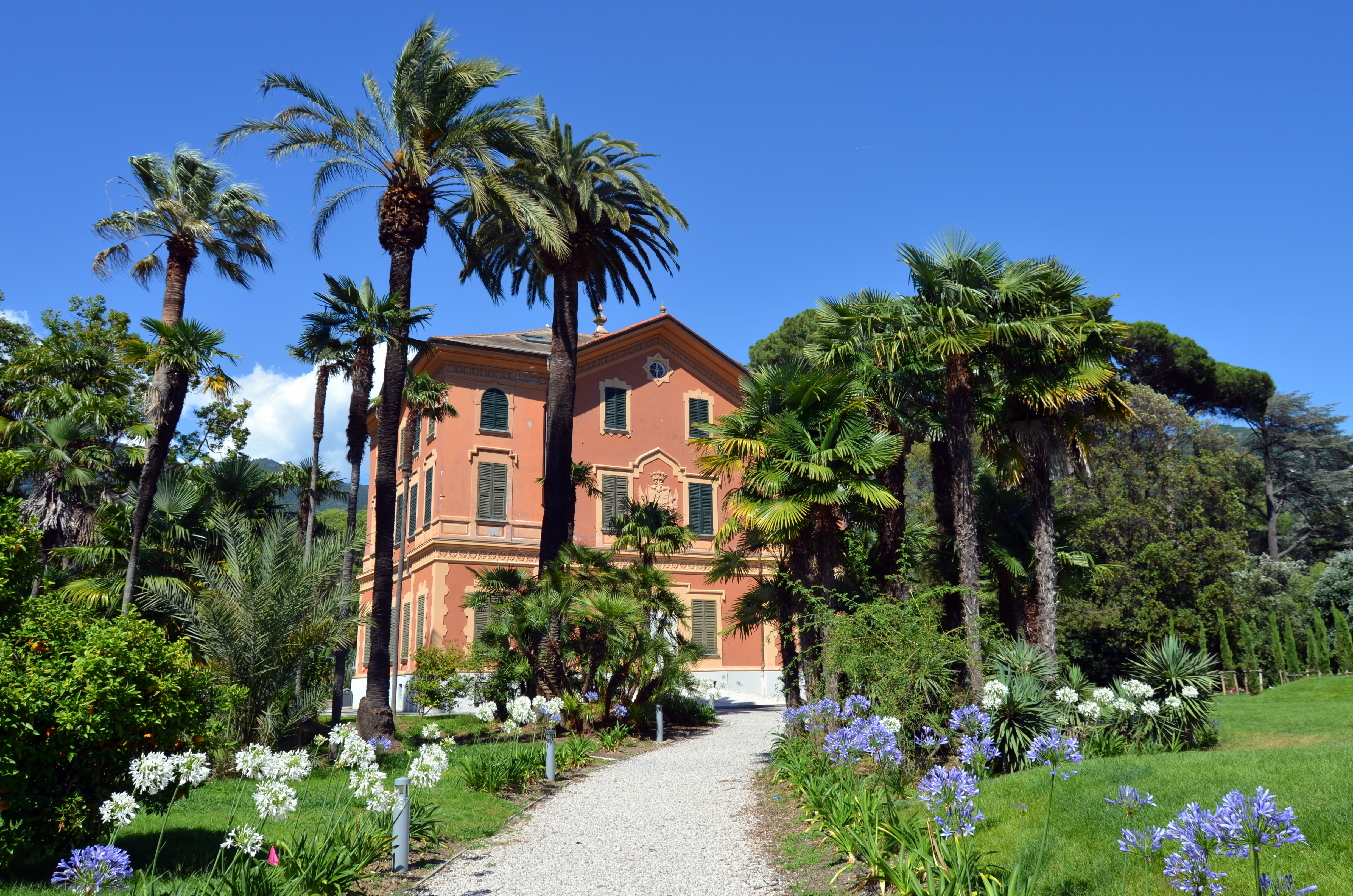 Serie di immagini di villa Tigullio a Rapallo, Liguria, Italia